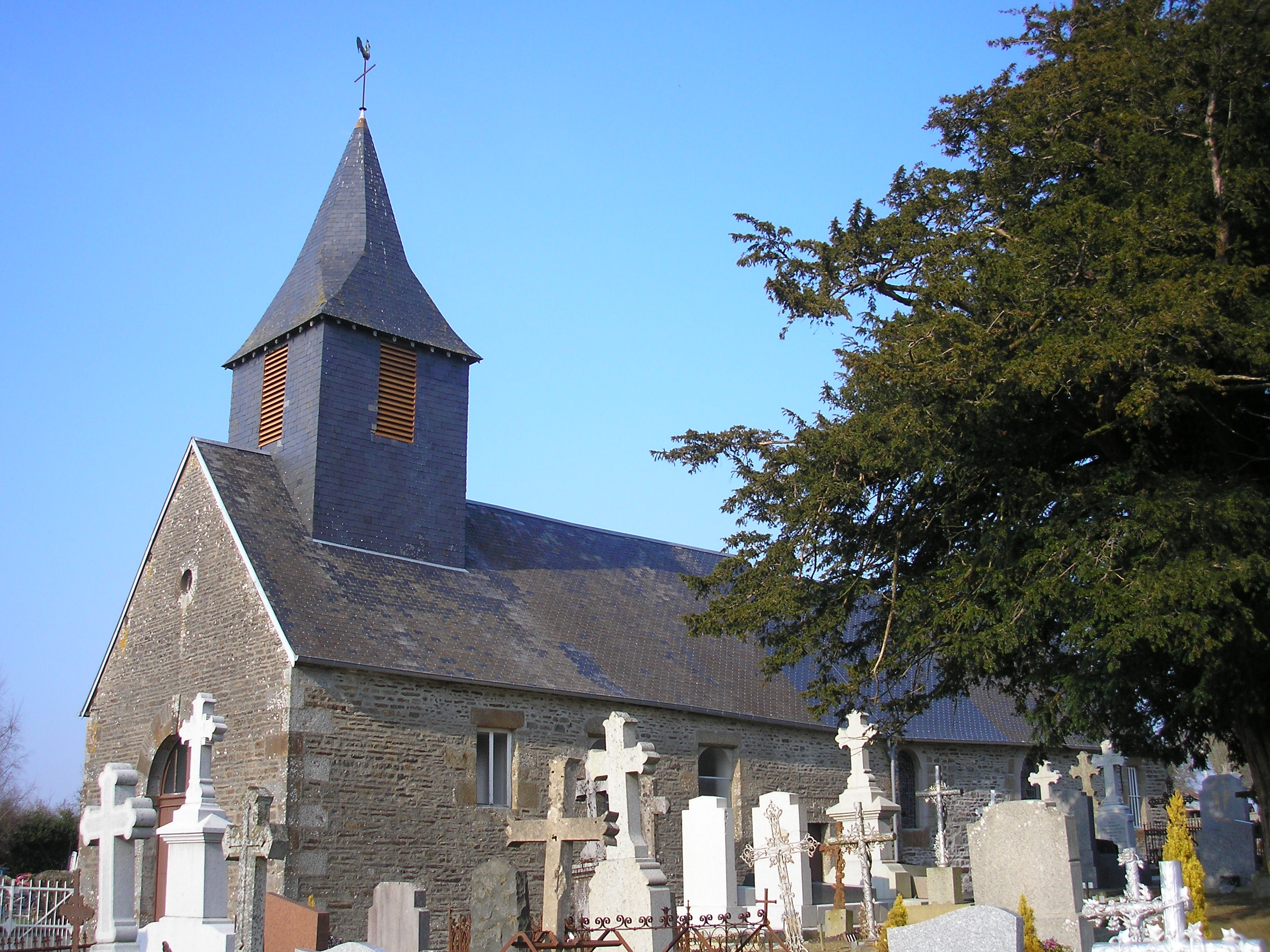 Le Ménil-Ciboult (Normandie, France). L'église Notre-Dame-de-la-Nativité.